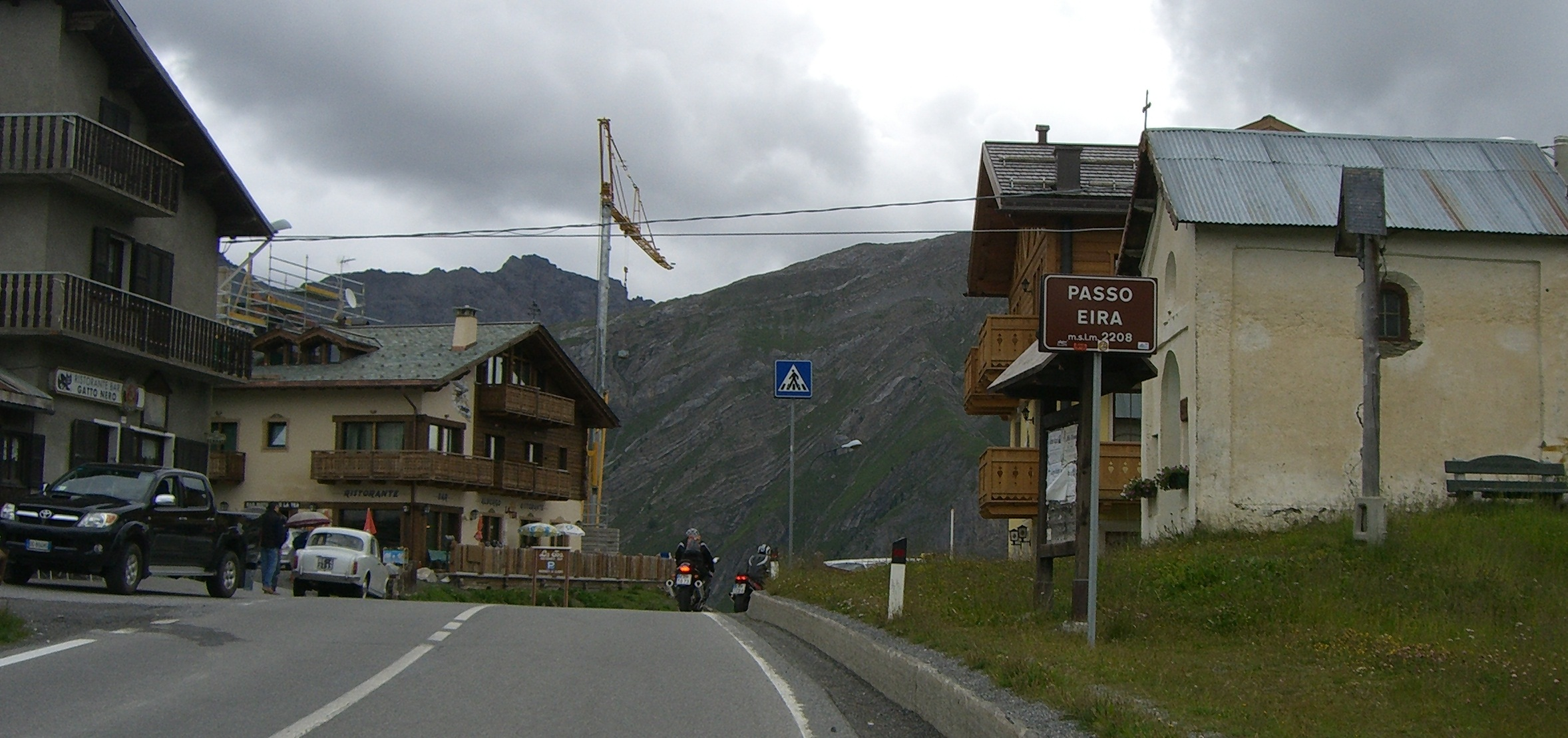 Passhöhe am Passo Eira